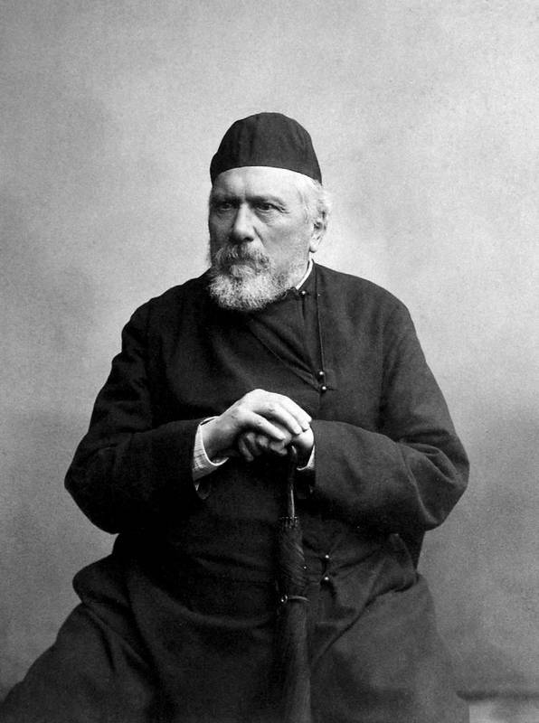 Лесков, Николай Семёнович